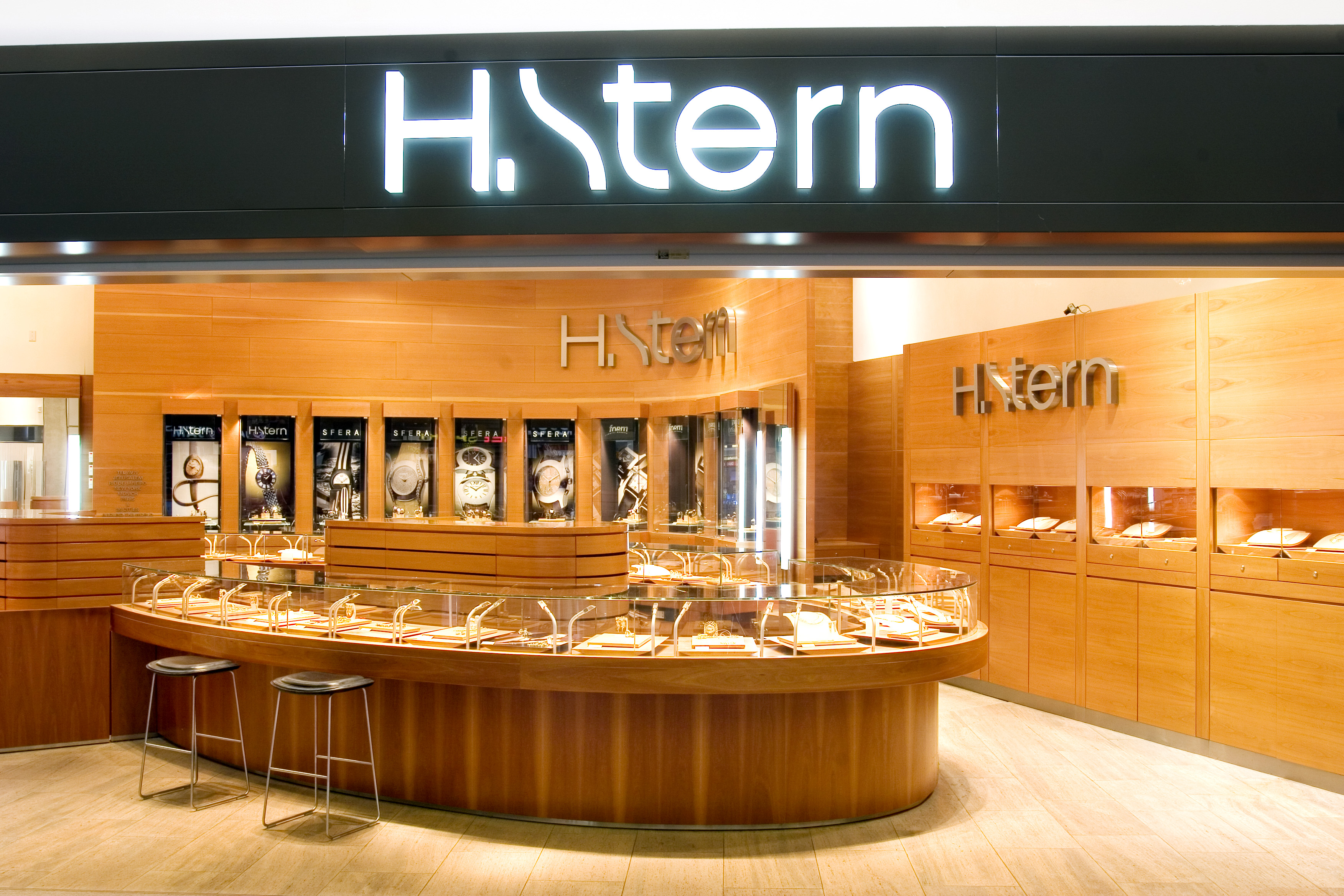 חנות ה.שטרן בנמל התעופה בן גוריון